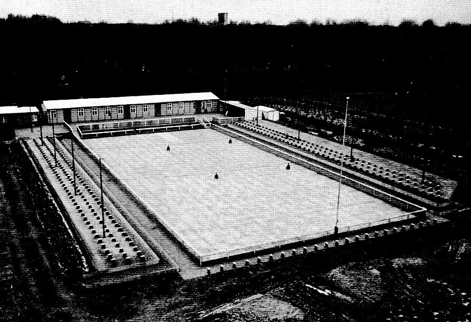 Rollschuhbahn des Rollschuhclubs Bremerhaven am Ostrand des Bürgerparks